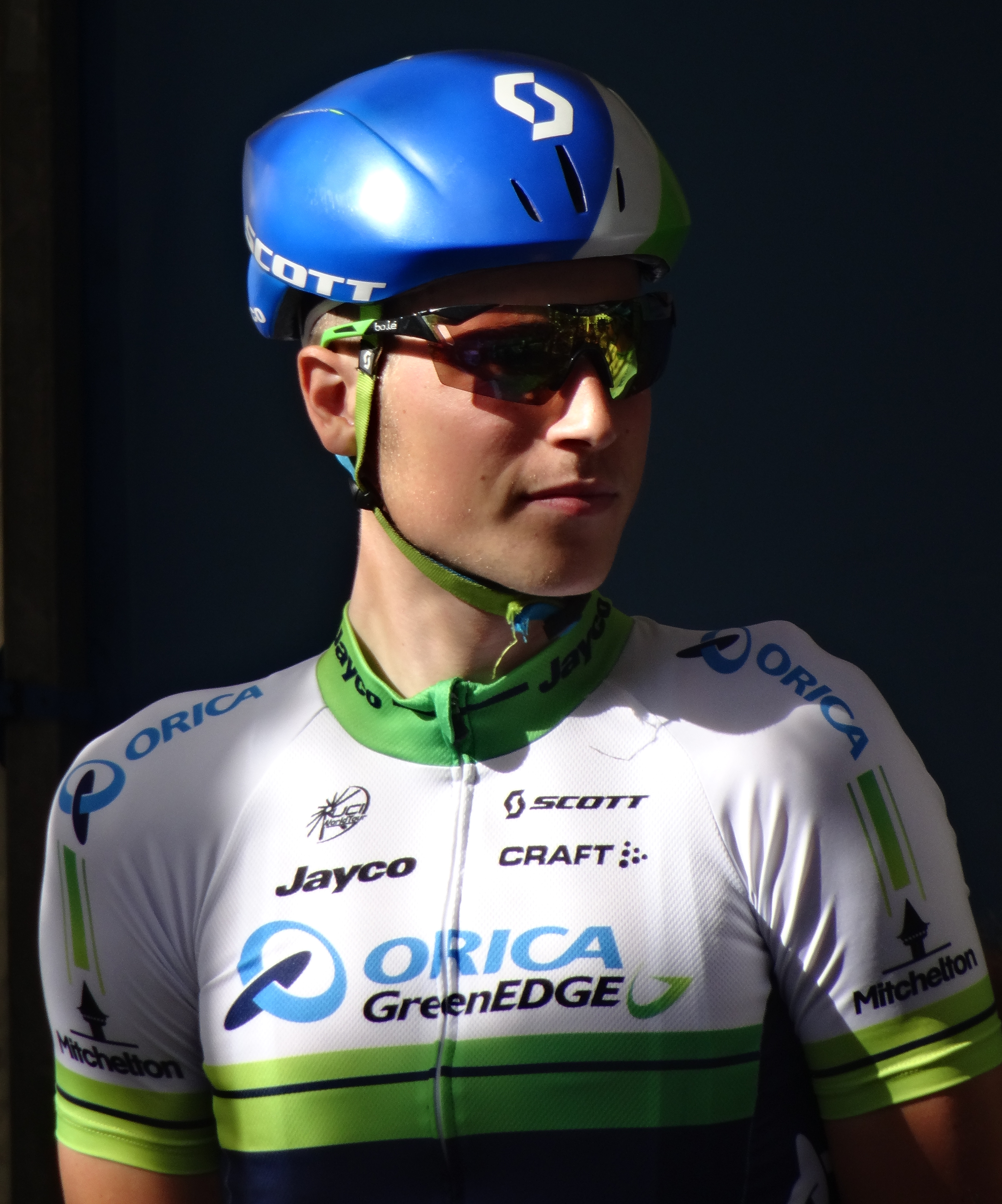 Reportage photographique réalisé le jeudi 2 octobre à l'occasion du départ de la première étape de l'Eurométropole Tour 2014 à La Louvière, Belgique.